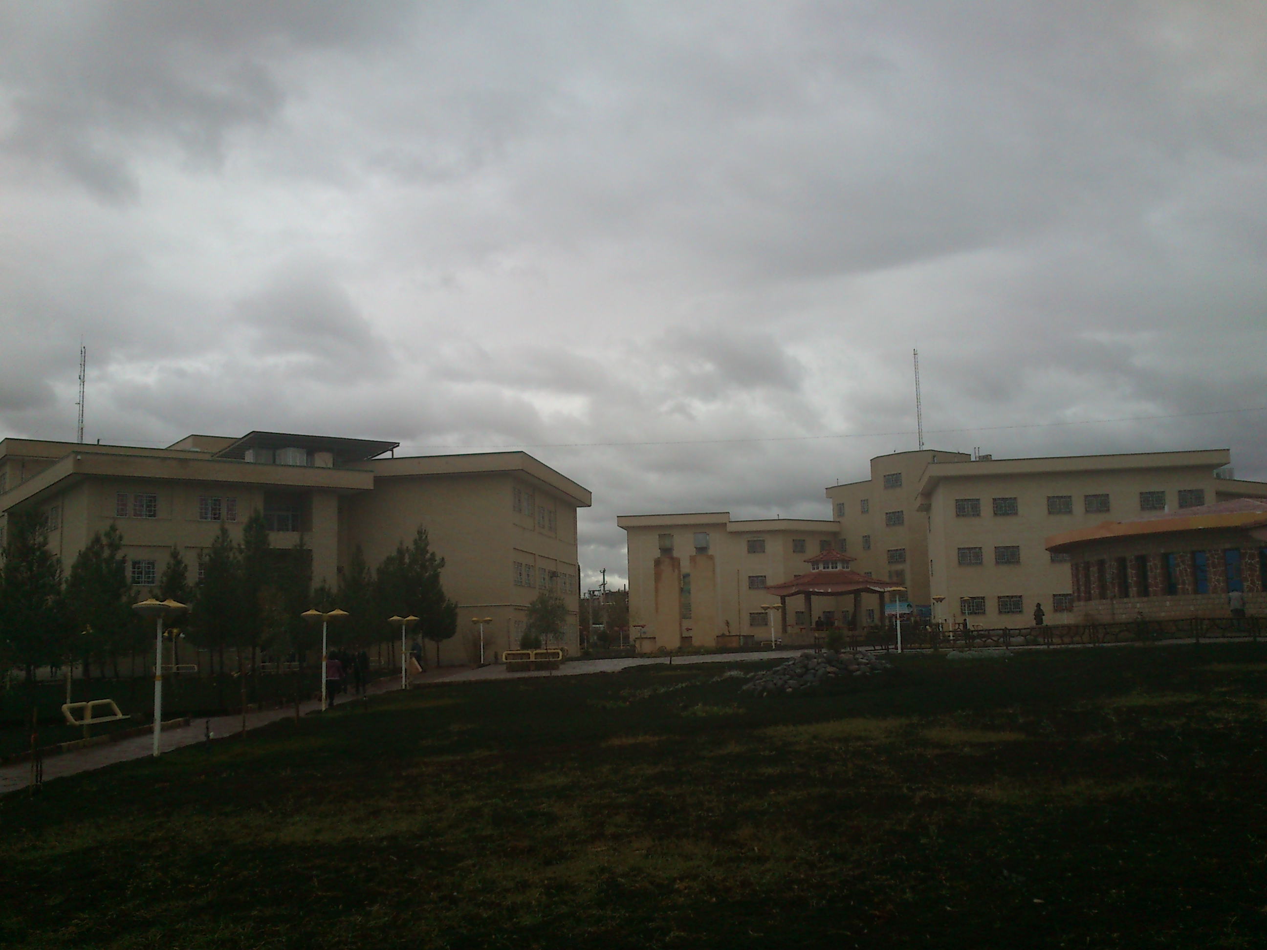 دانشکده فنی مهندسی و دانشکده علوم انسانی